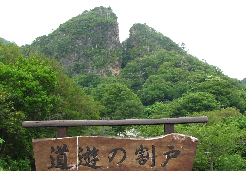 佐渡金山のシンボル「道遊の割戸（どうゆうのわれと）」。露天掘りの跡。